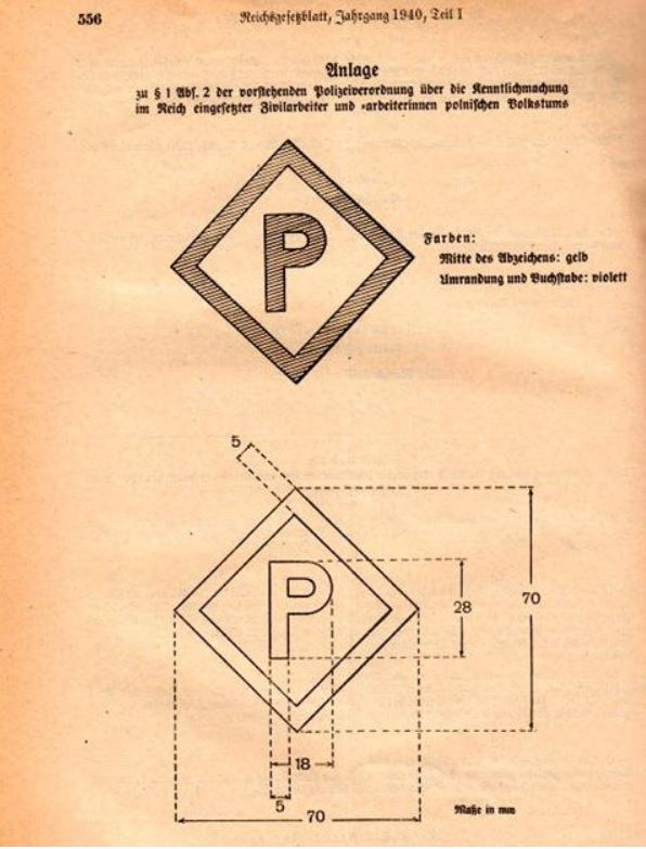 Richtlinien für Größe und Form des „P“-Abzeichens in der Anlage zu den "Polen-Erlassen" in der Anlage zur "Polizeiverordnung über die Kenntlichmachung im Reich eingesetzter Zivilarbeiter und -arbeiterinnen polnischen Volkstums" vom 8.3.1940, RGBl. I, S. 556